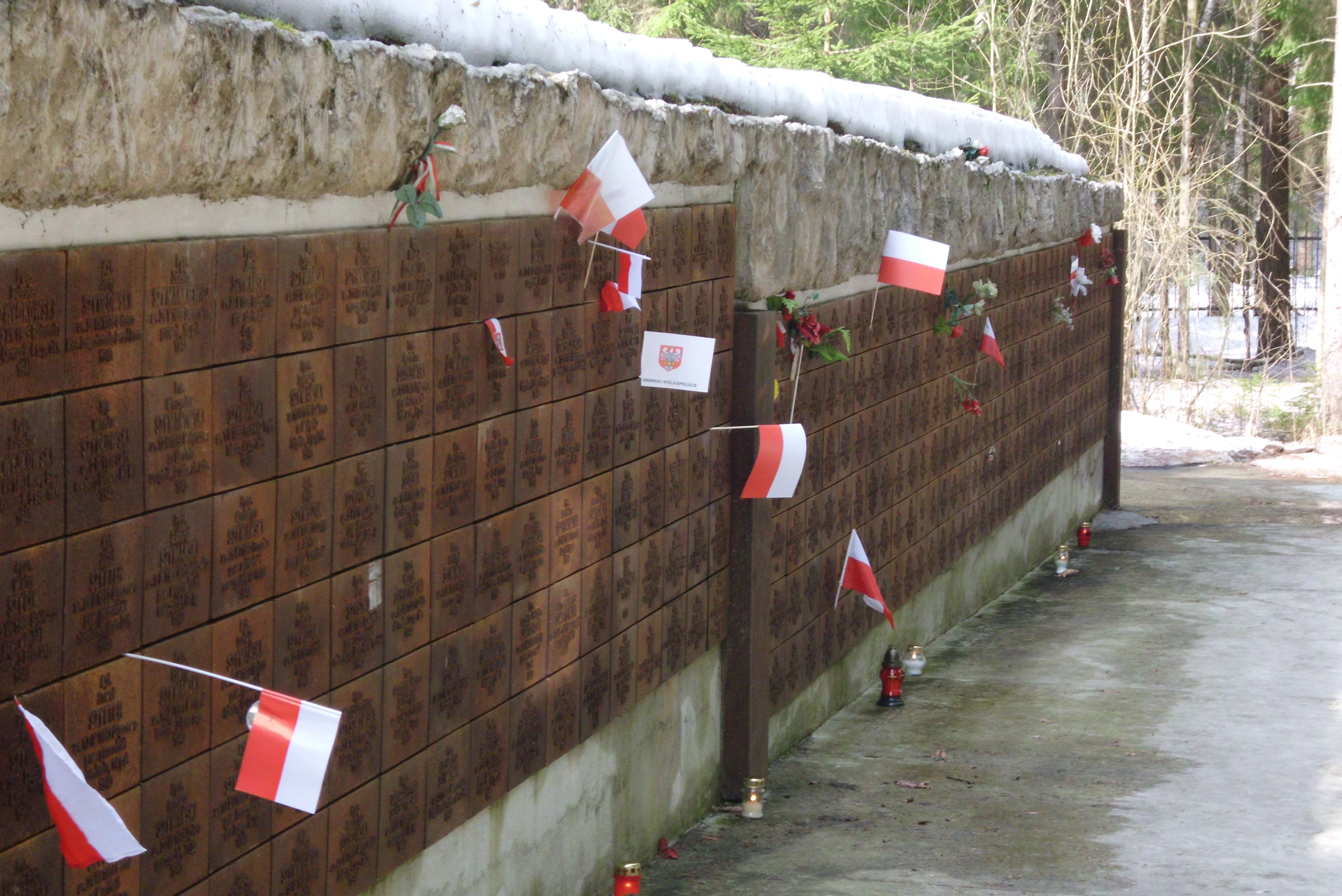 Kwiecień 2013